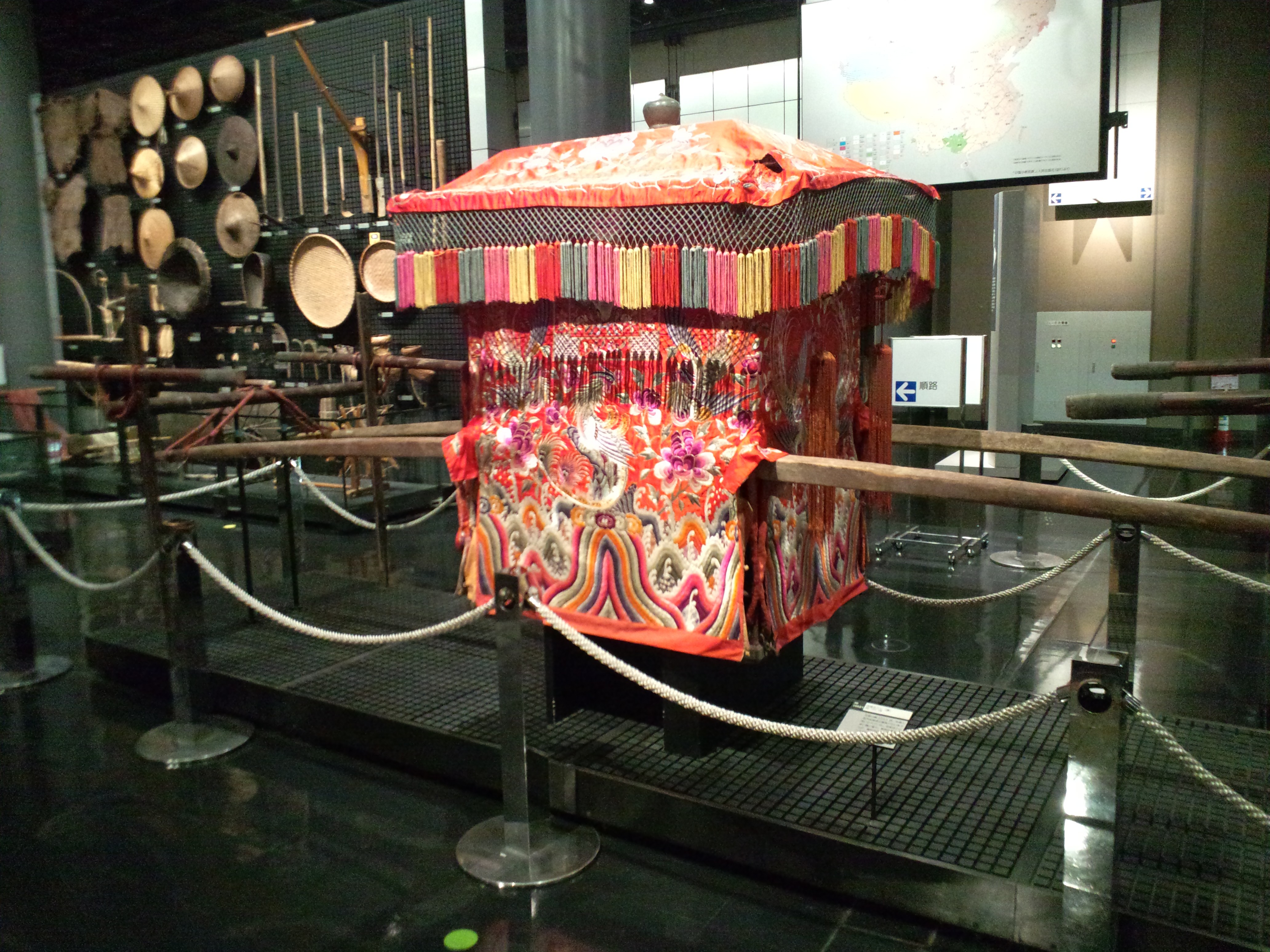 国立民族学博物館（大阪） 花嫁の輿（中国、北京）